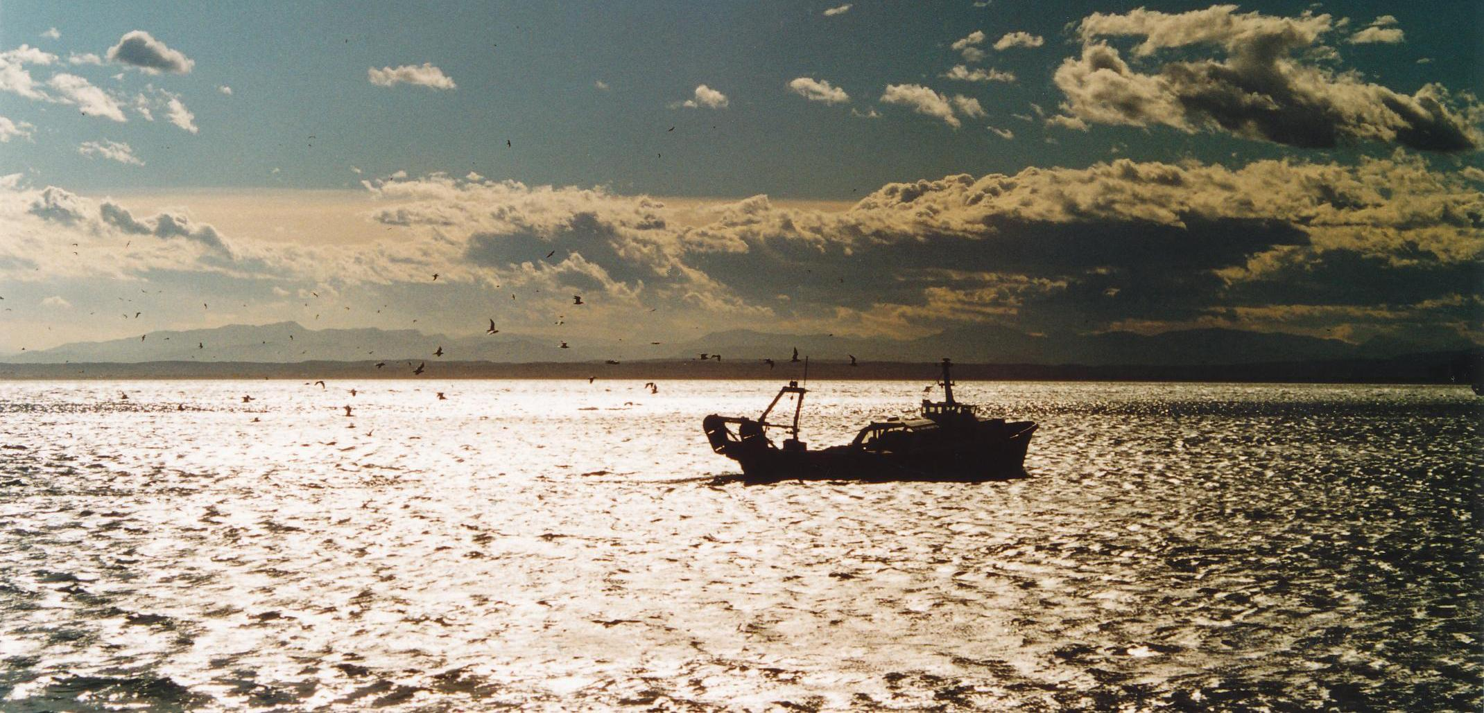 Rückkehr der Fischer in den Heimathafen (hier: Roses (Girona, Spanien)) Datum: 09/2009 Urheber: Michael Pfeiffer Quelle: privates Fotoalbum des Urhebers